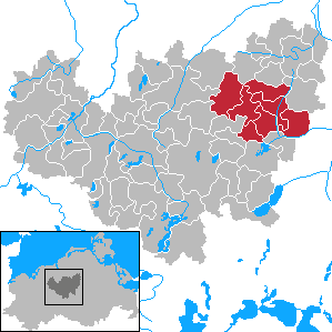 Former Amt Jördenstorf in Mecklenburg-Vorpommern - District Güstrow